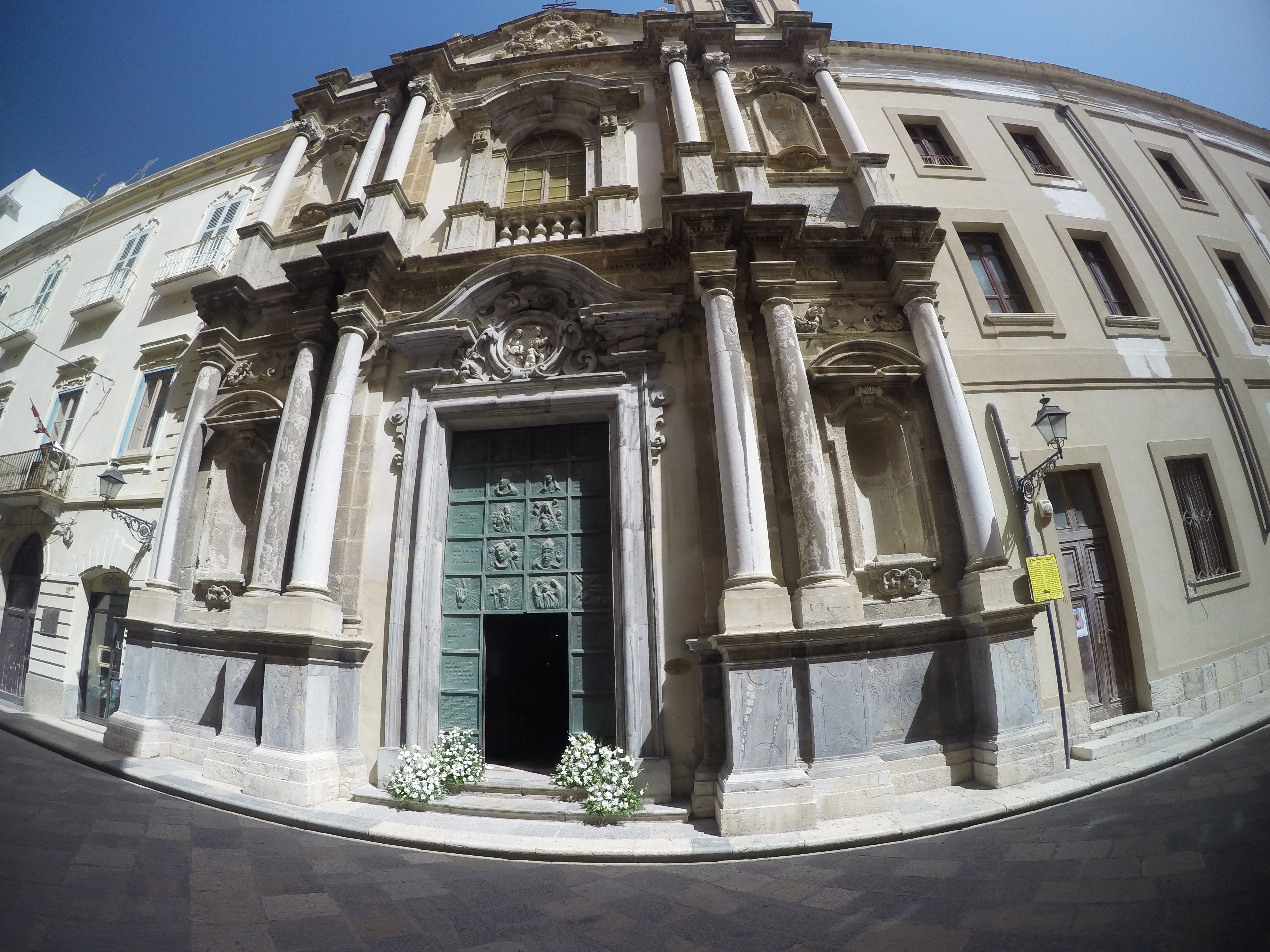 Trapani - Via Giuseppe Garibaldi - Chiesa e Monastero di S. Maria dell'Itria